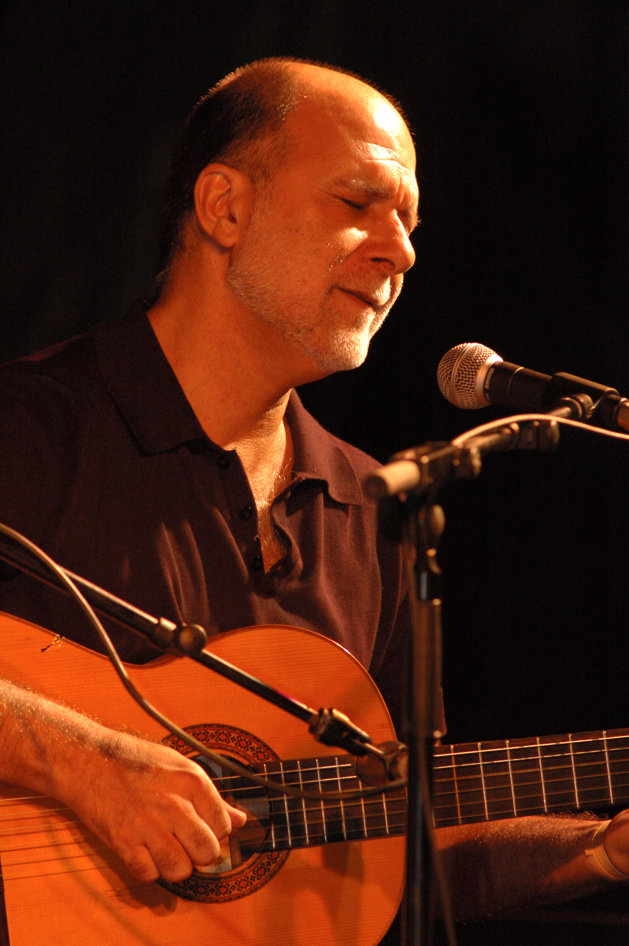 Josep Tero al MHC el 2005.